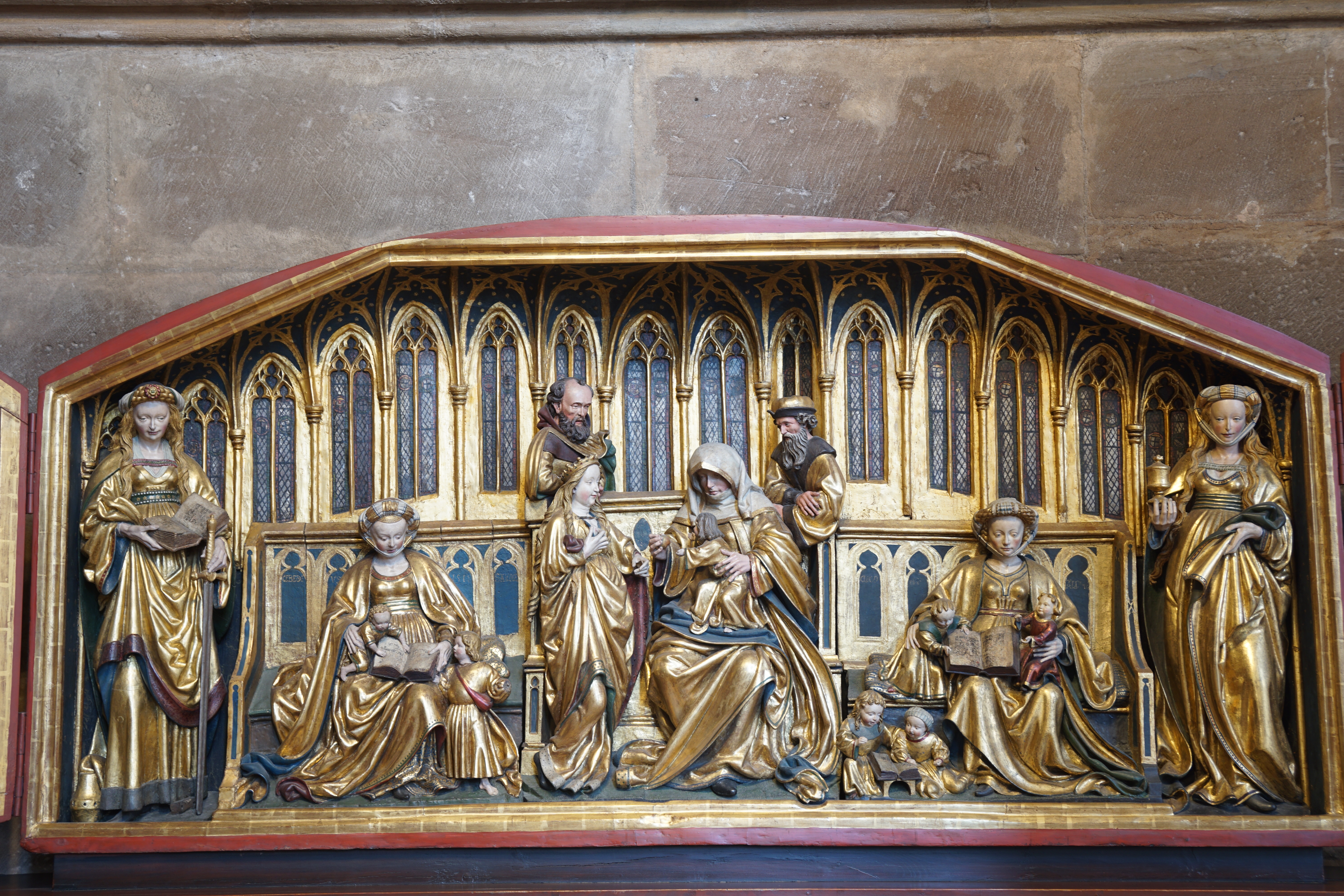 Siehe Dateiname